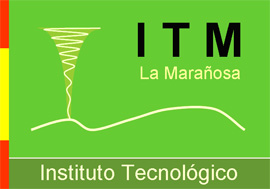 Logotpo ITM